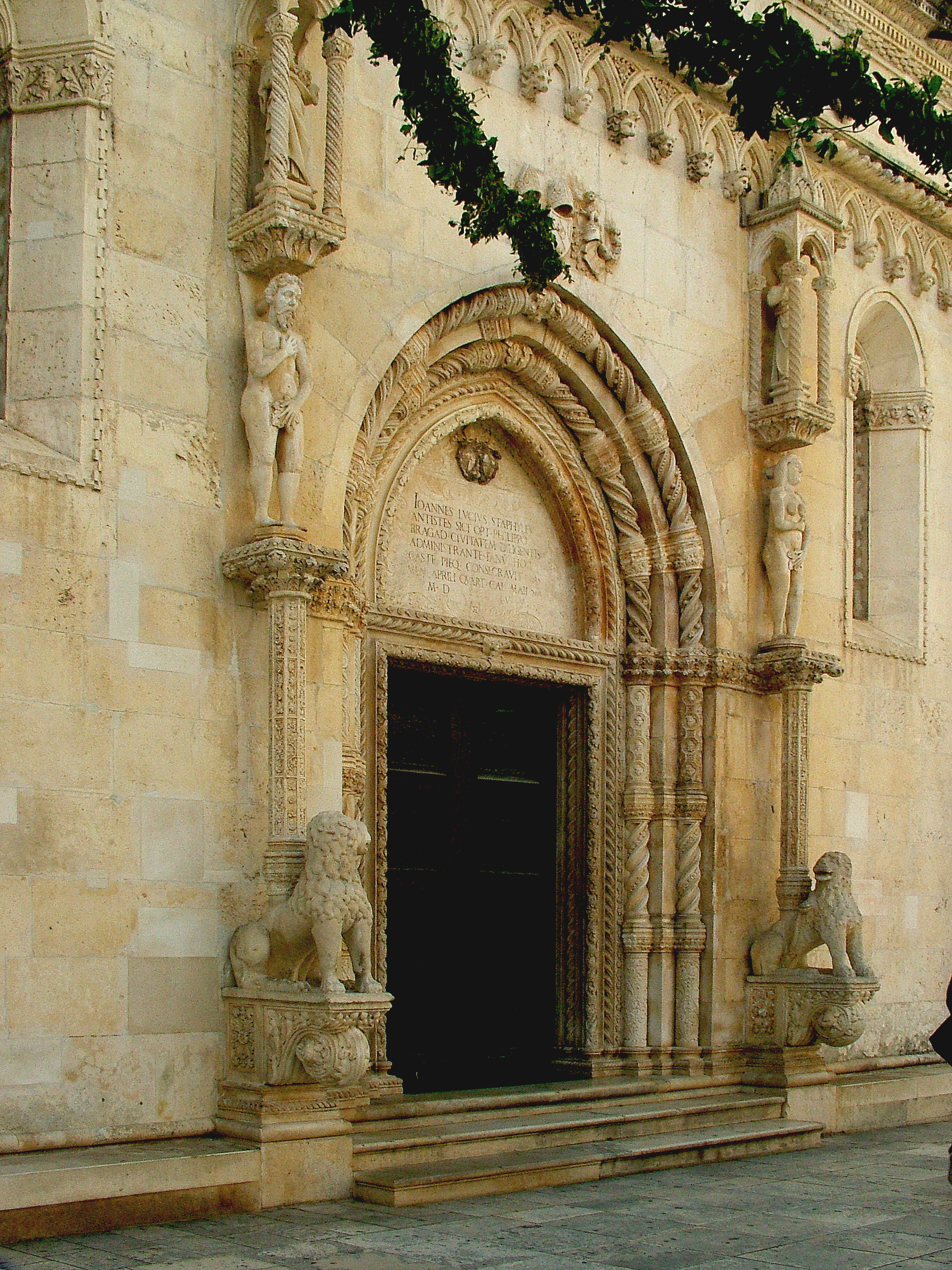 Sibenik, Szt. Jakab templom északi kapuja (Horvátország)